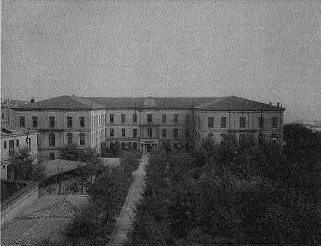 Mekteb-i Sultani (Galatasaray Lisesi), 1880 ve 1893 yılları